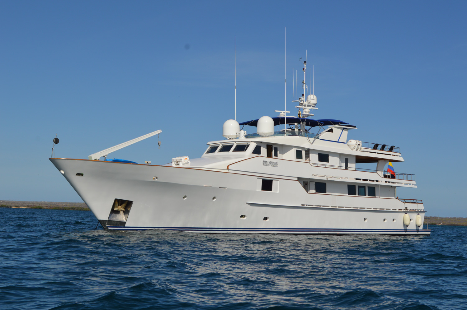 Foto exterior del Yate Stella Maris.